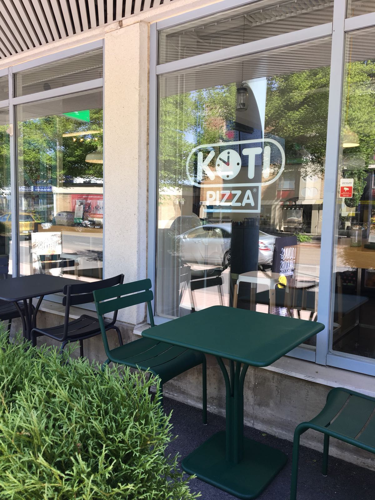 Kotipizzaa saa nauttia terassillakin